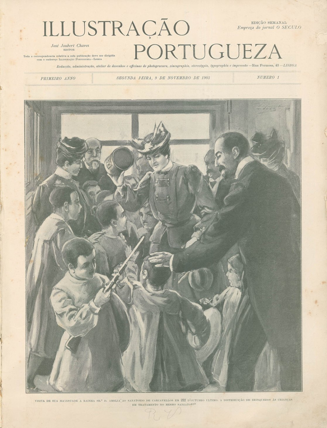 Capa do 1º número da revista Illustração Portugueza : Visita de S.M. a Rainha Sª D. Amélia ao Sanatório de Carcavelos em 22 de Outubro de 1903. A distribuição de brinquedos às crianças em tratamento no mesmo sanatório.